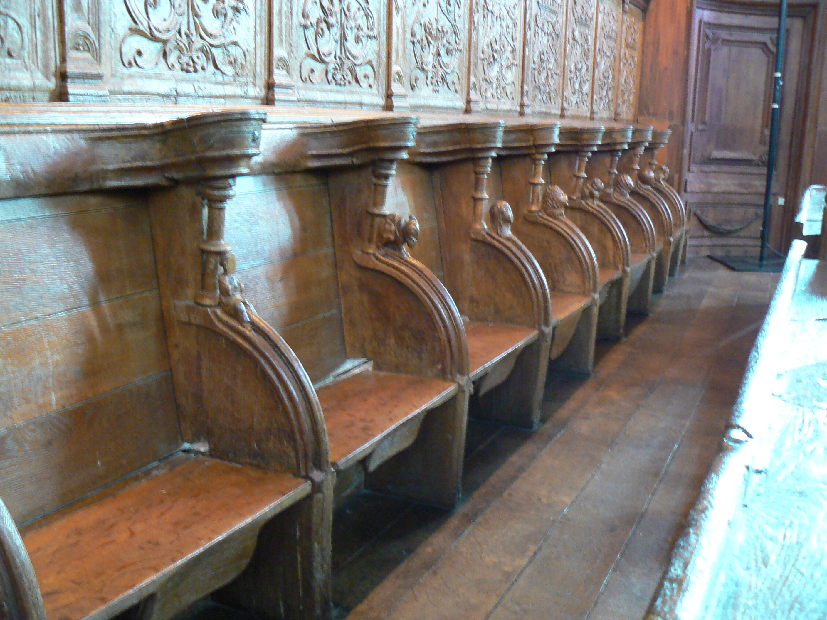 Stalles du chœur.